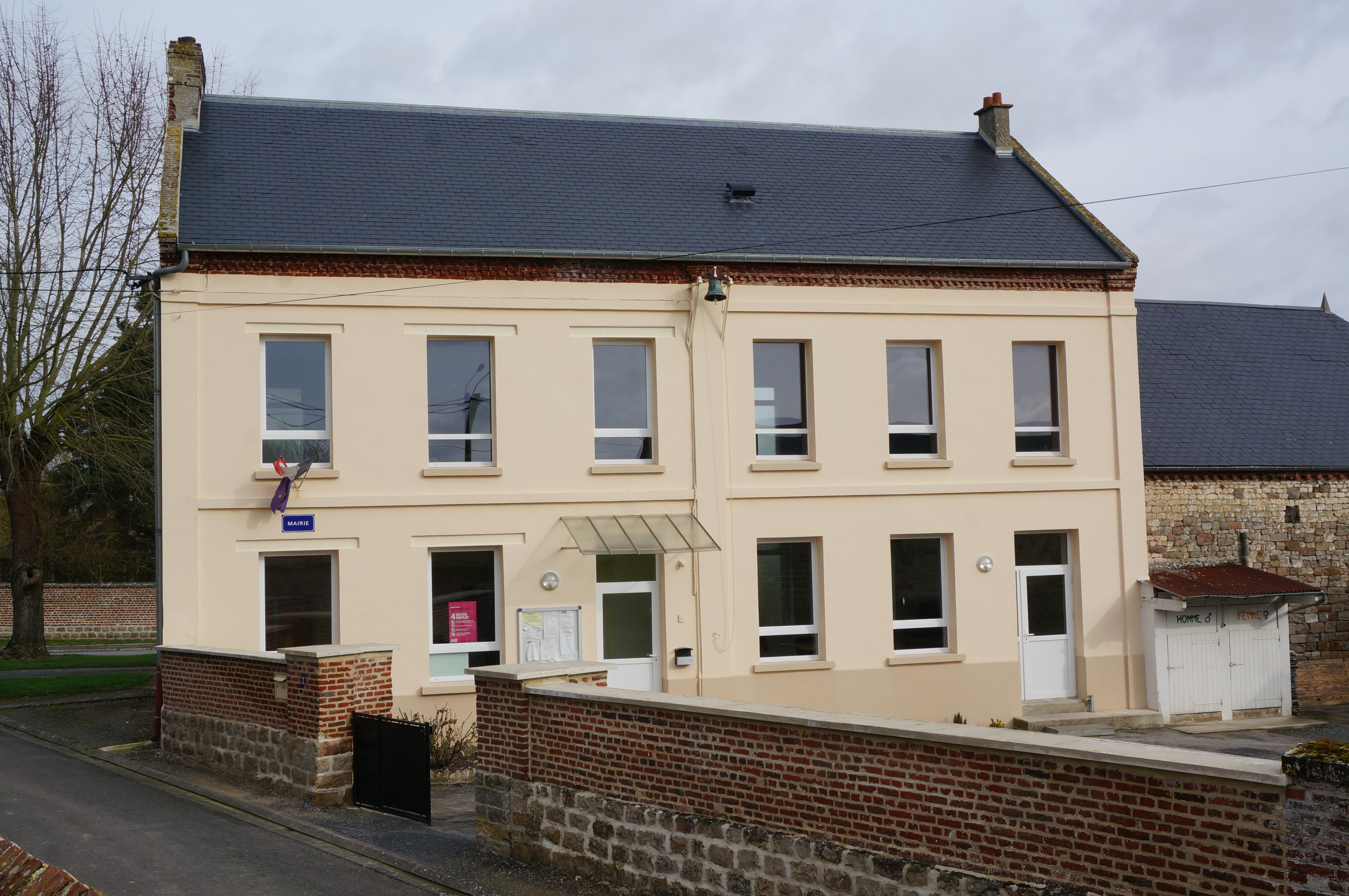 Vue de Barenton-sur-Serre.